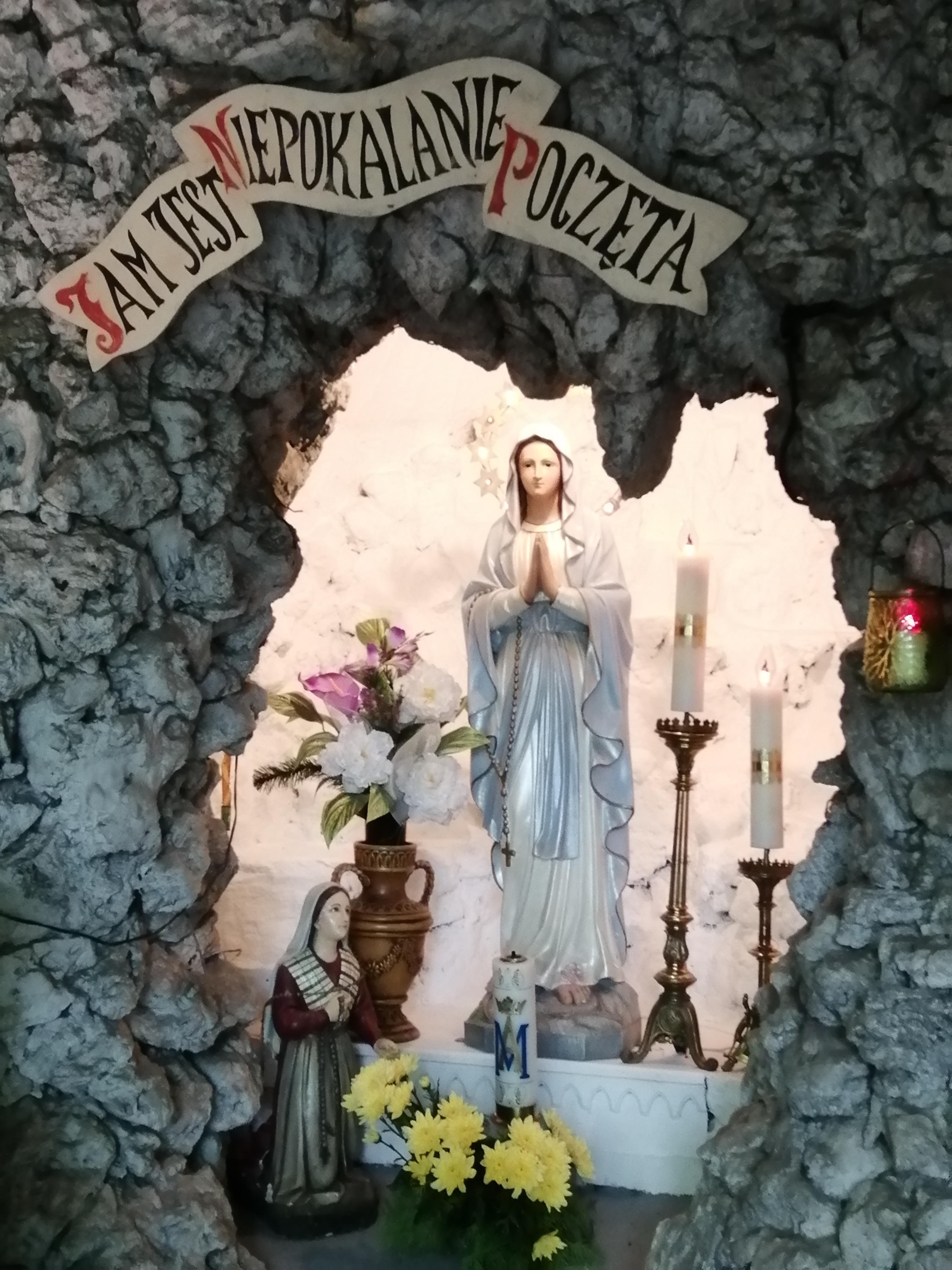 Park Ojców Kamilianów w Tarnowskich Górach - grota maryjna